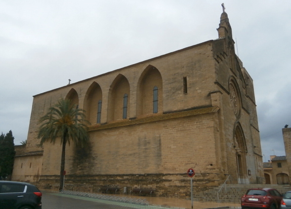 Kirche in Alcudia